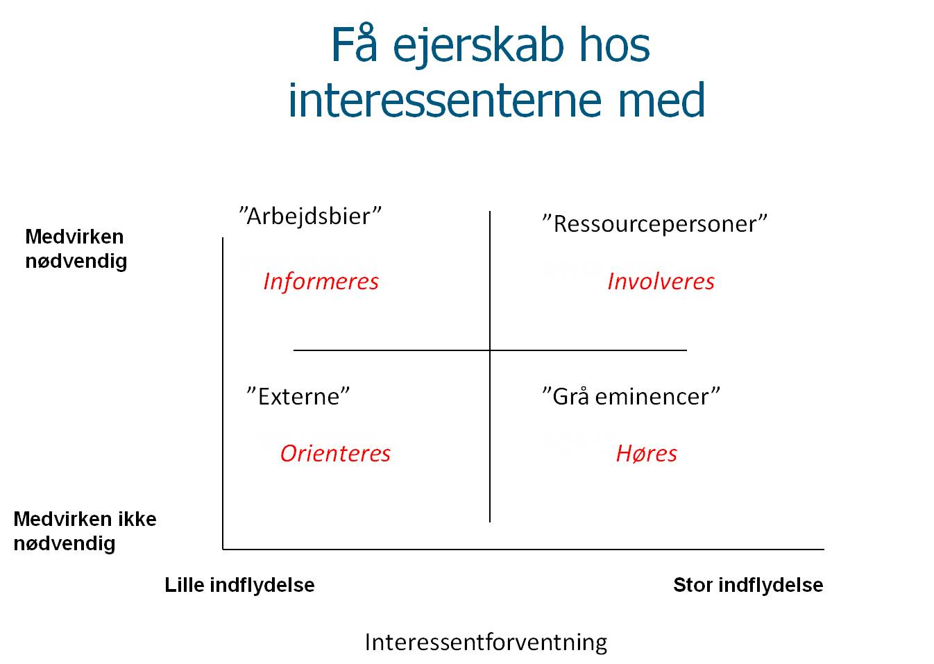 Kommunikationsmodel i forhold til interessenter